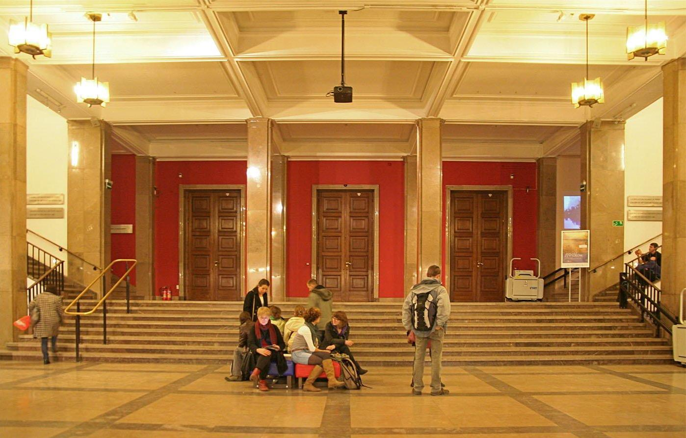 Główny hall muzeum, widok od wejścia